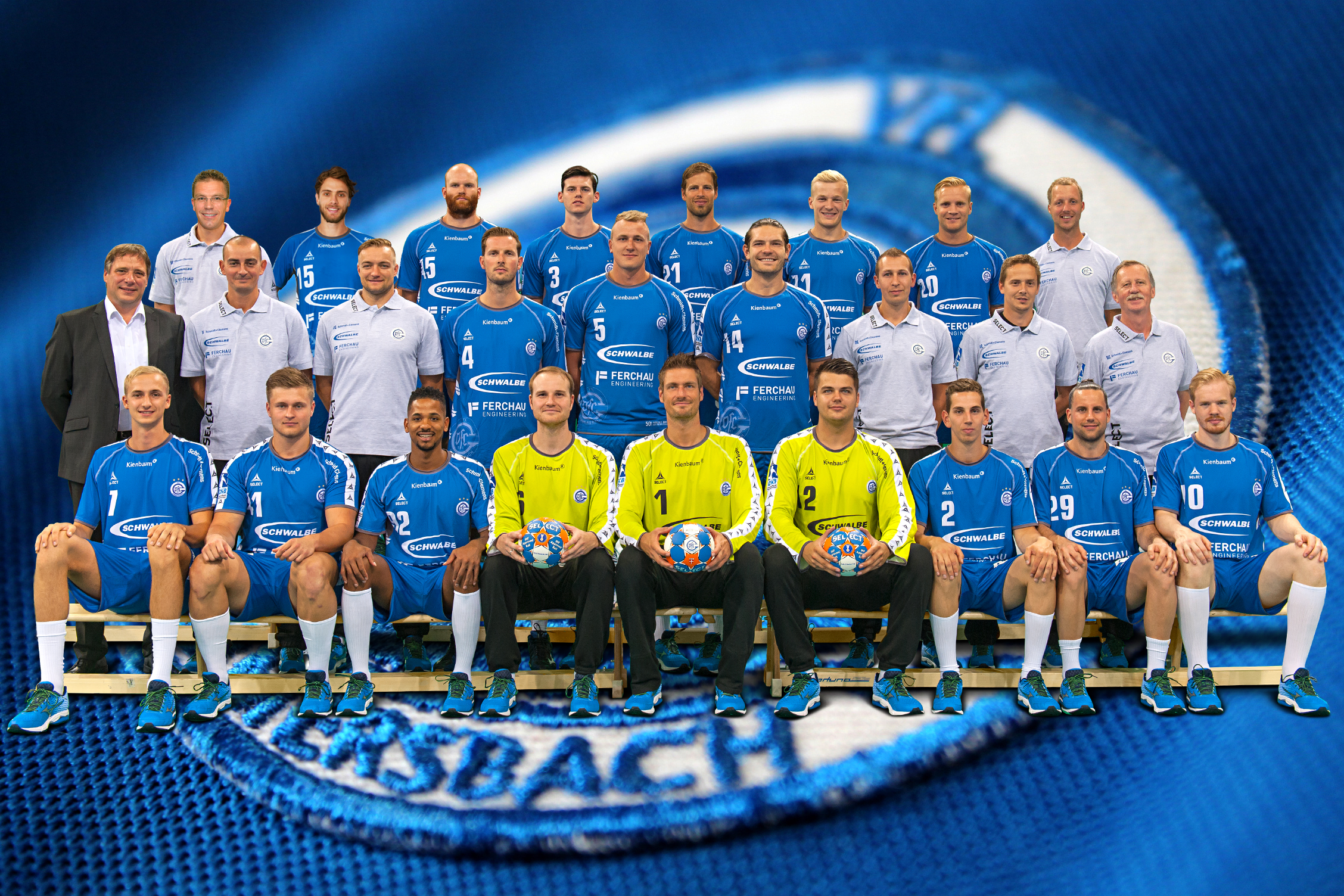 DKB HBL VfL Gummersbach Saison 2015-2016